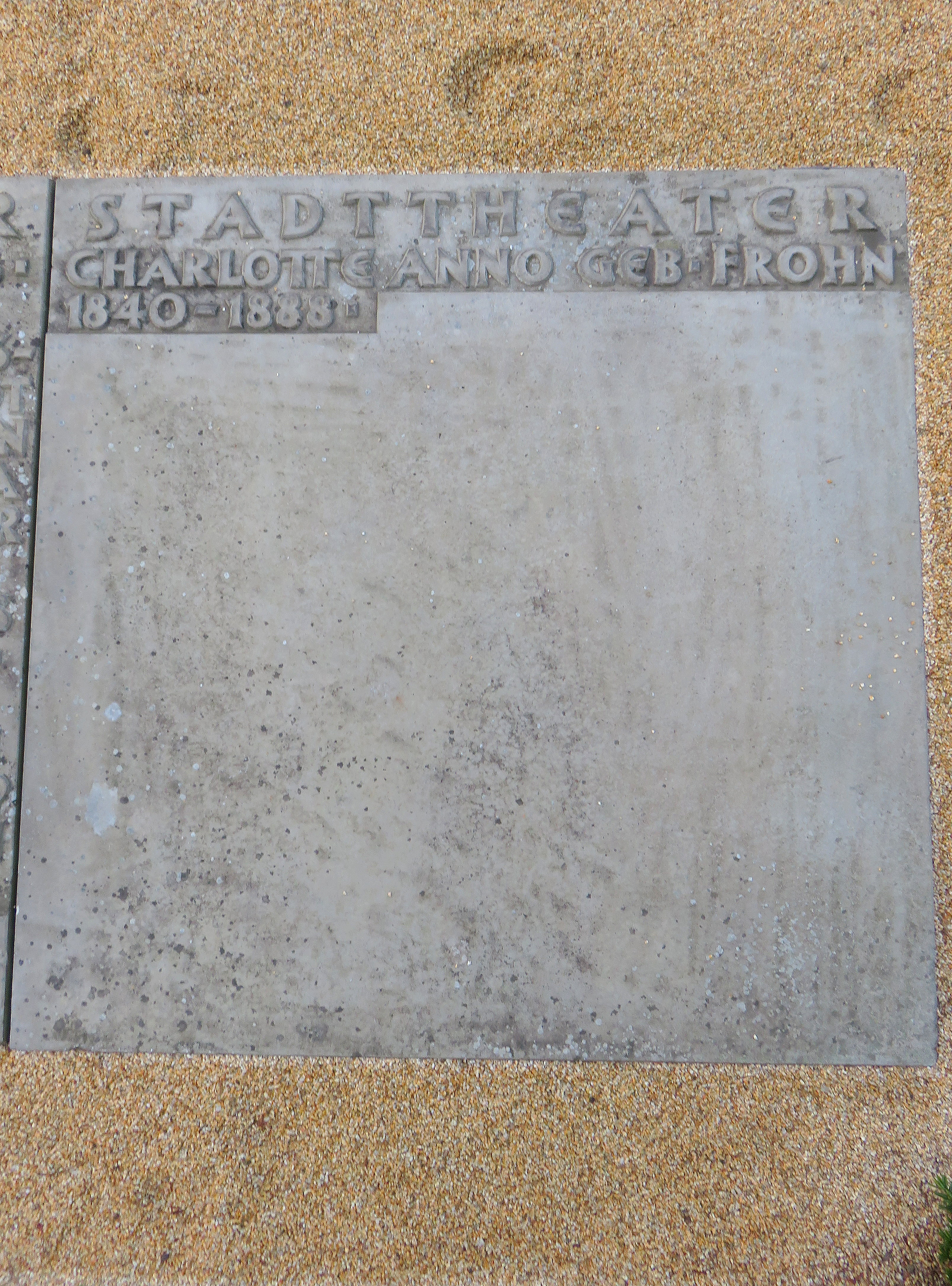 Sammelgrabmal Stadt-Theater im Bereich des Althamburgischen Gedächtnisfriedhofs auf dem Hamburger Friedhof Ohlsdorf zu Ehren von u. a.links: Jacob Herzfeld, Friedrich Ludwig Schmidt, Karl August Lebrun, Jean Baptist Baison, Johann Christopher Gloy, Josef Wurda.rechts: Charlotte Anno geb. Frohn.